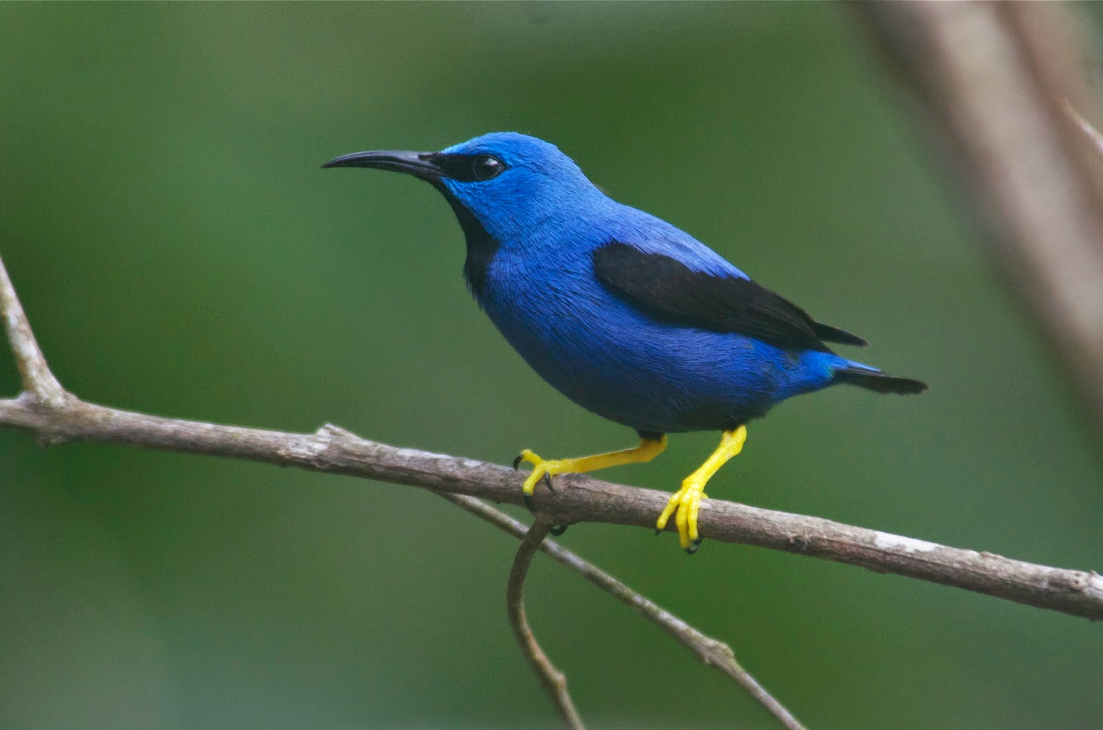 Shining Honeycreeper Cyanerpes lucidus, Nusagandi, Panama